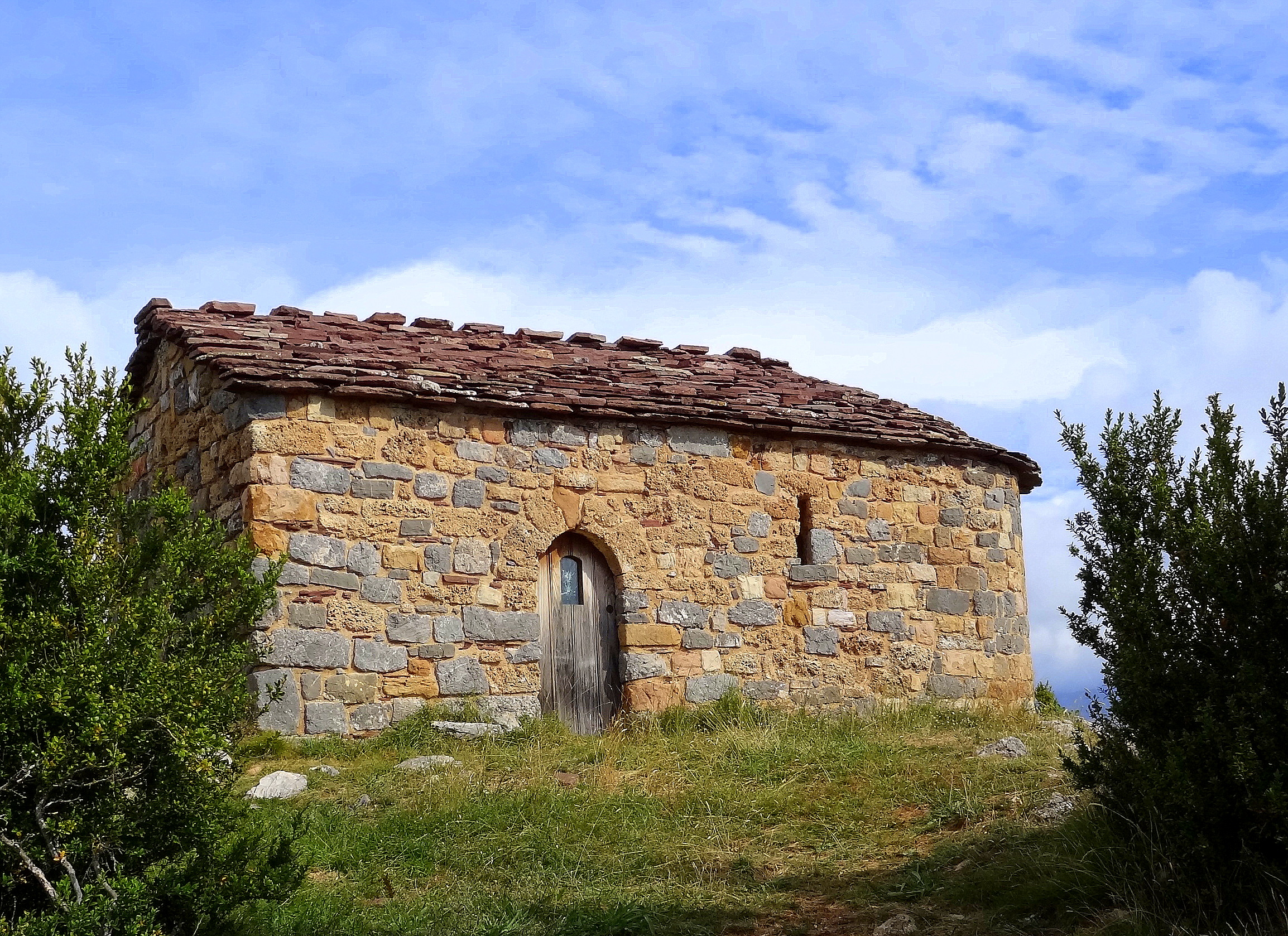 a la part alta del port de bonansa : excel.lent mirador